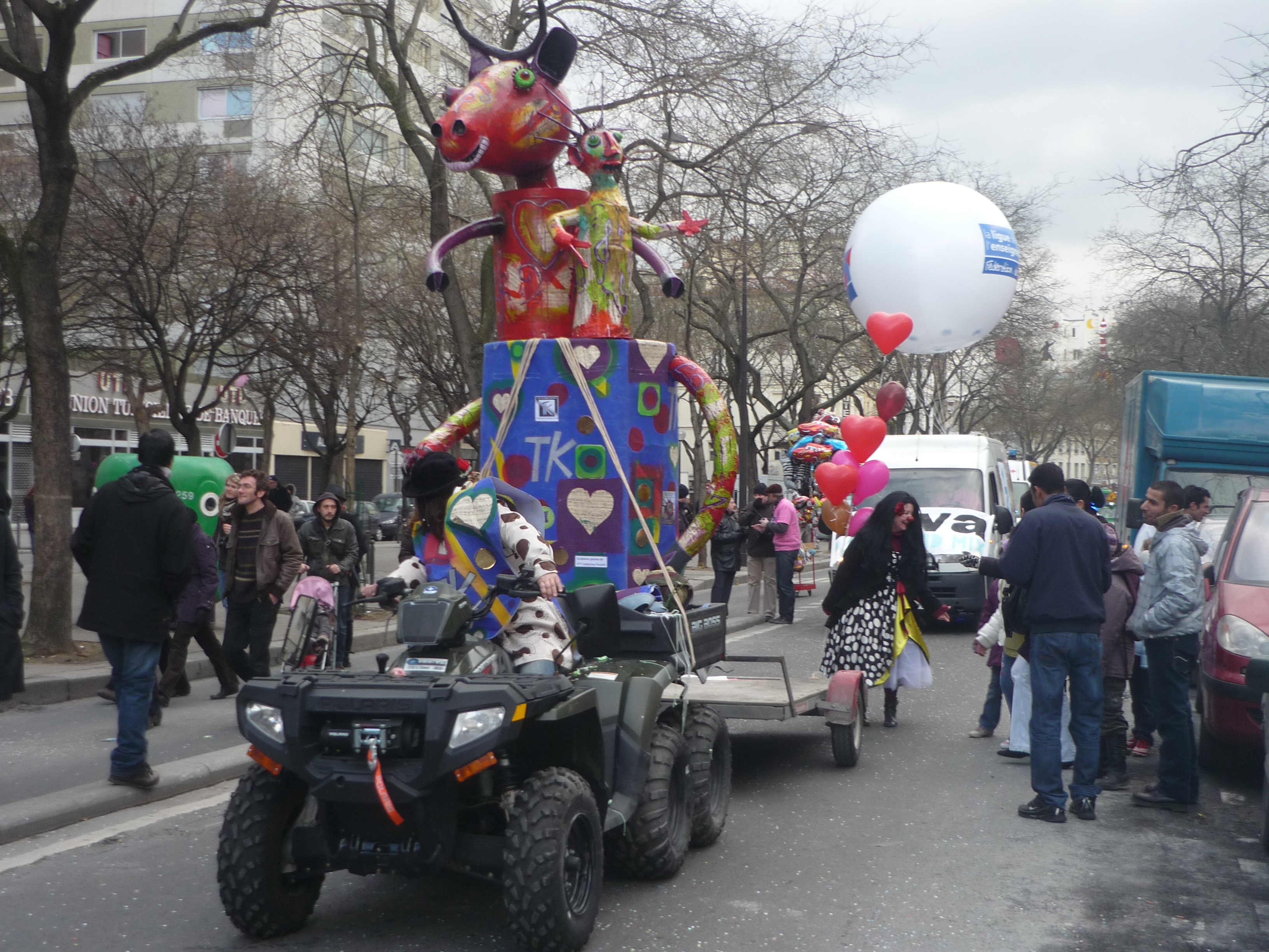 Un aspect du cortège du Carnaval de Paris 2010.